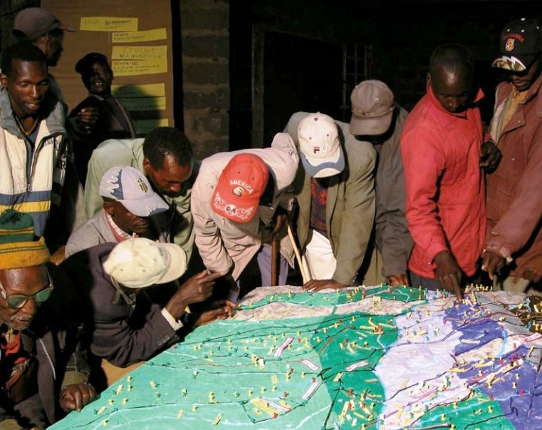 Cartografia participativa.